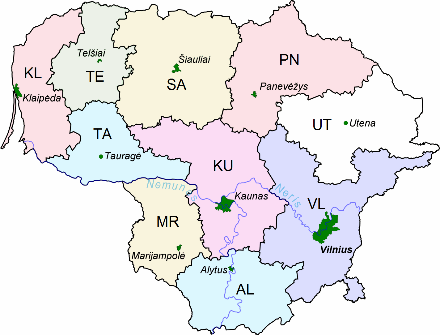 Lietuvos apskritys su ISO 3166-2 apskričių kodais